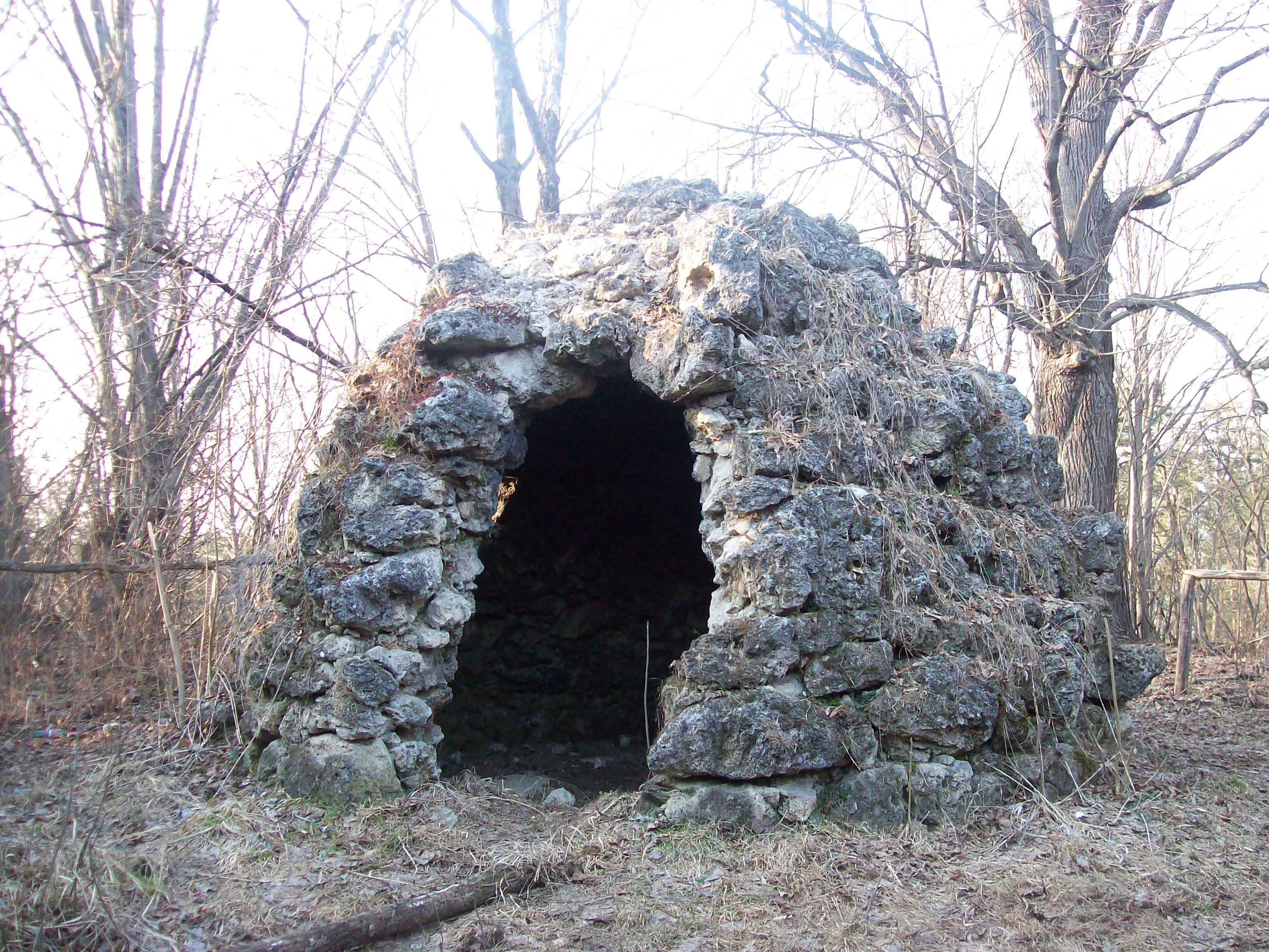 "Csúnyamunka" (Török-torony) Ostoroson